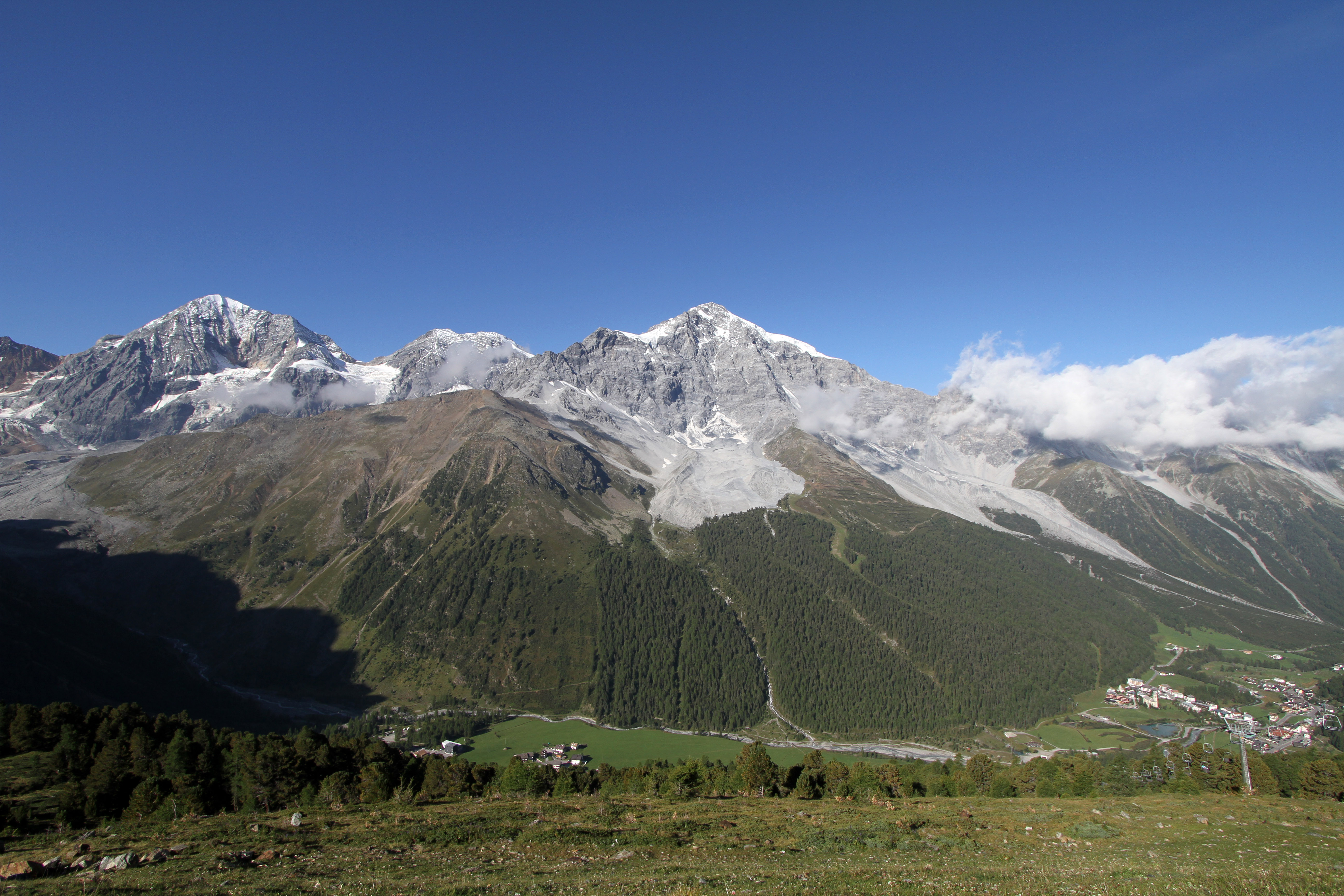 Gruppo dell'Ortles visto da Pulpito/Kanzel (m.2350 s.l.m.). Da sinistra: Gran Zebrù (m. 3857 s.l.m.), Zebrù (m. 3745 s.l.m.) e Ortles (m. 3902 s.l.m.)